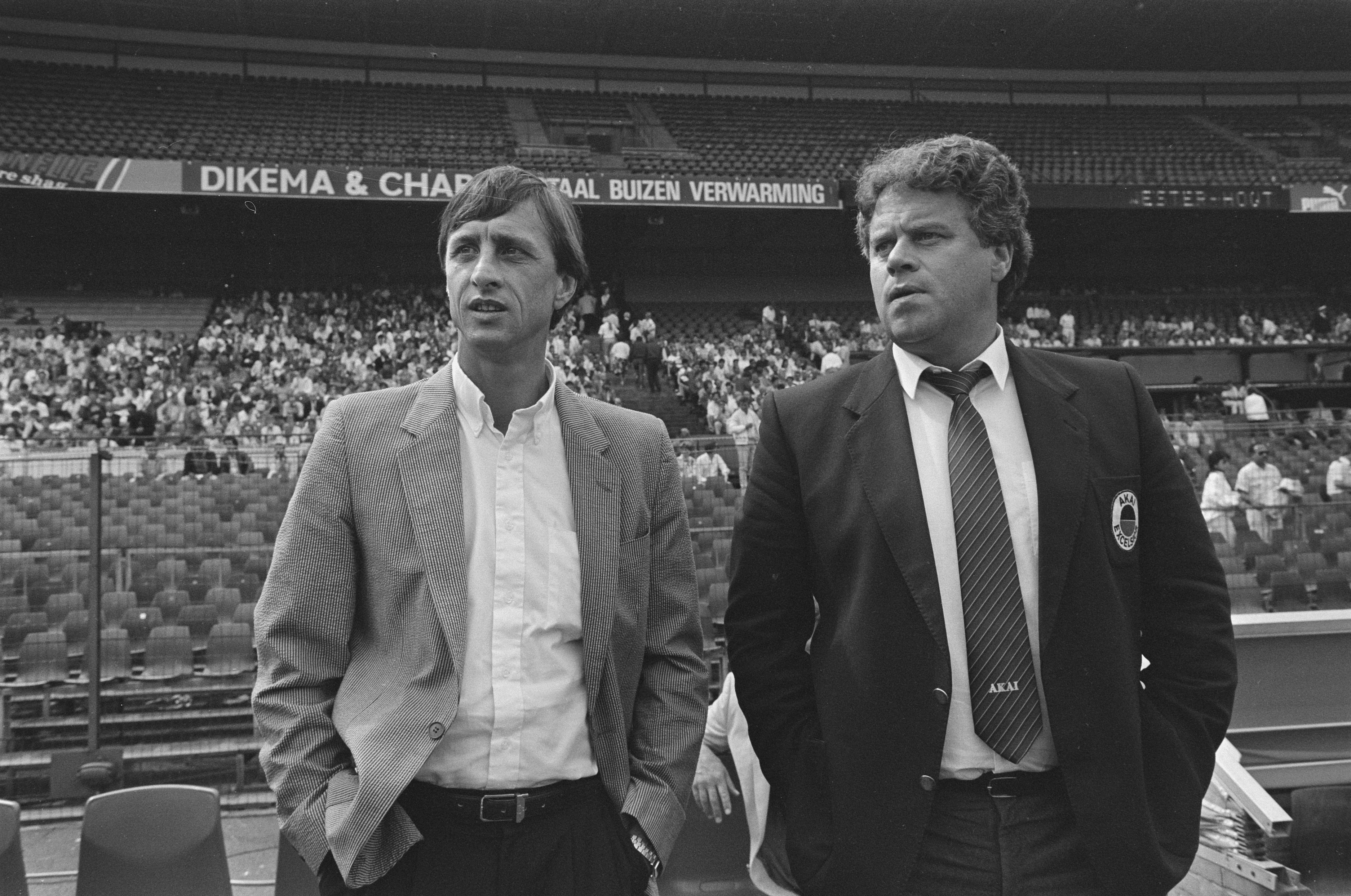 Collectie / Archief : Fotocollectie Anefo Reportage / Serie : [ onbekend ] Beschrijving : Excelsior tegen Ajax 2-3, technisch directeur Johan Cruy (l) en Excelsiortrainer Rob Jacobs Datum : 18 augustus 1985 Trefwoorden : sport, voetbal Persoonsnaam : Cruijff, Johan Instellingsnaam : Excelsior Fotograaf : Croes, Rob C. / Anefo Auteursrechthebbende : Nationaal Archief Materiaalsoort : Negatief (zwart/wit) Nummer archiefinventaris : bekijk toegang 2.24.01.05 Bestanddeelnummer : 933-3997